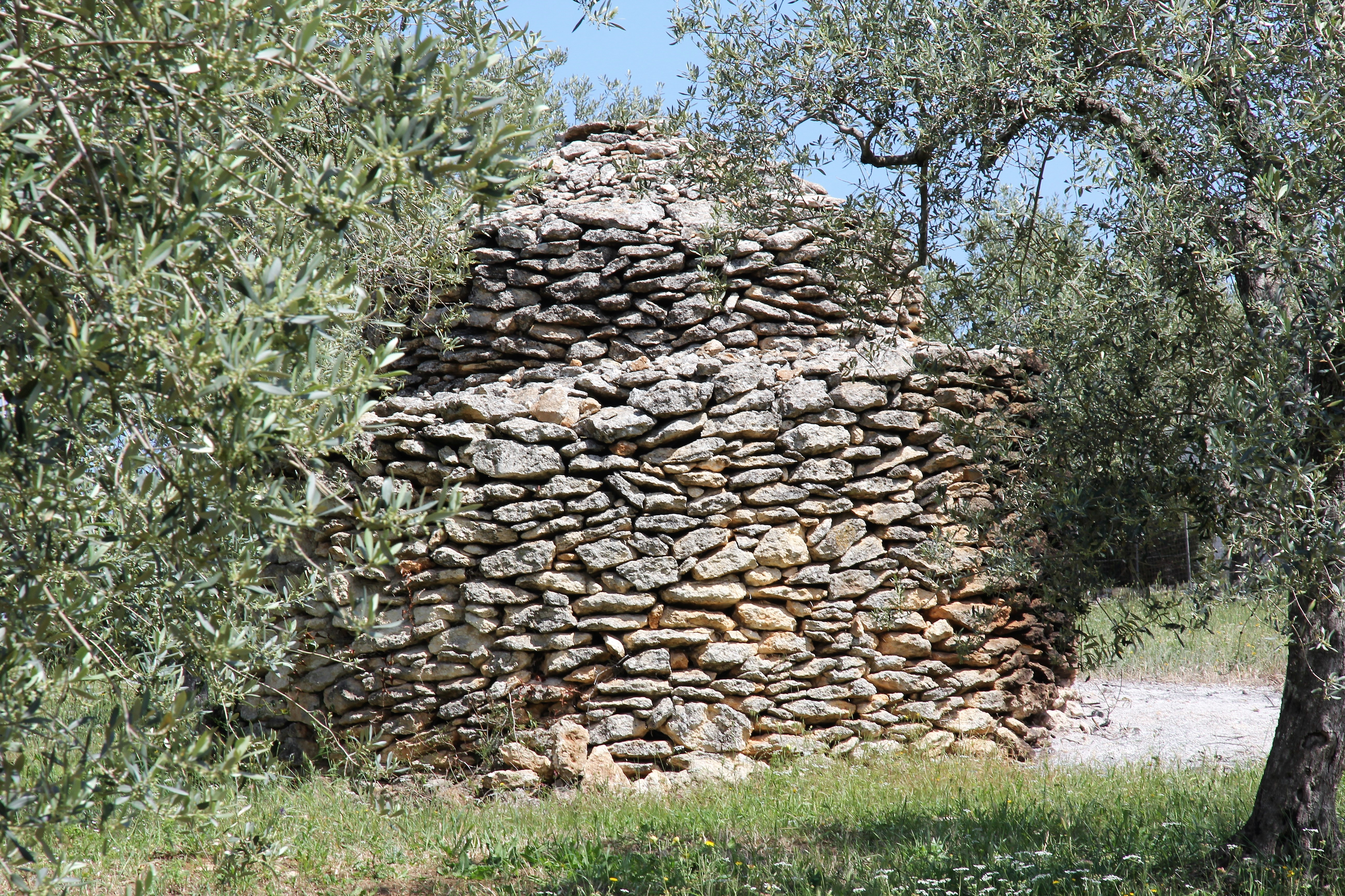 Sassari, turricula